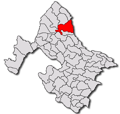 Categorie:Hărţi ale judeţului Mehedinţi